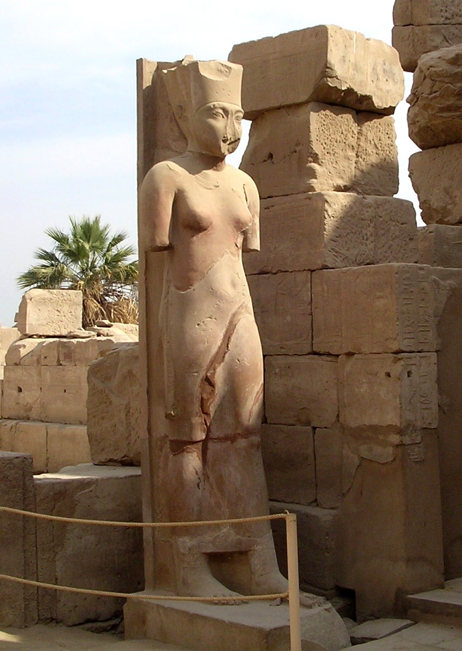 Autore: Amaunet Fonte: Lavoro proprio Descrizione: Statua della dea Amonet, Tempio di Karnak, Luxor, Egitto.